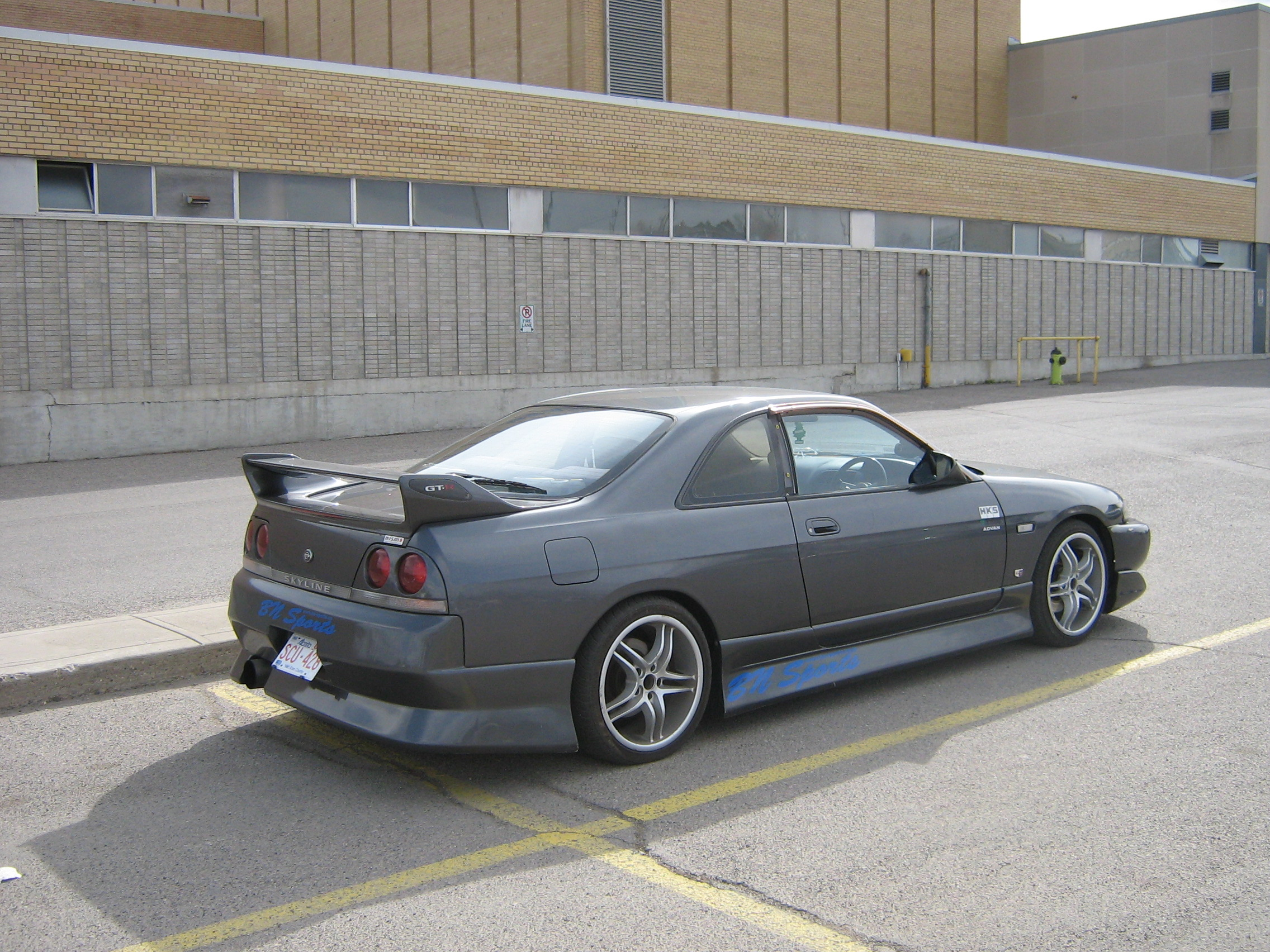 Nissan Skyline